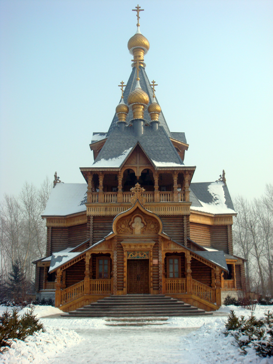 2006年7月，圣•尼古拉教堂复建工程在哈尔滨市香坊区阿什河畔开工，复建后的教堂将用作为尼古拉艺术馆，成为“伏尔加庄园”度假村的标志性建筑。尼古拉艺术馆以圣•尼古拉教堂为原形，按1比1的比例完全还原。伏尔加庄园于2009年底对游客开放。